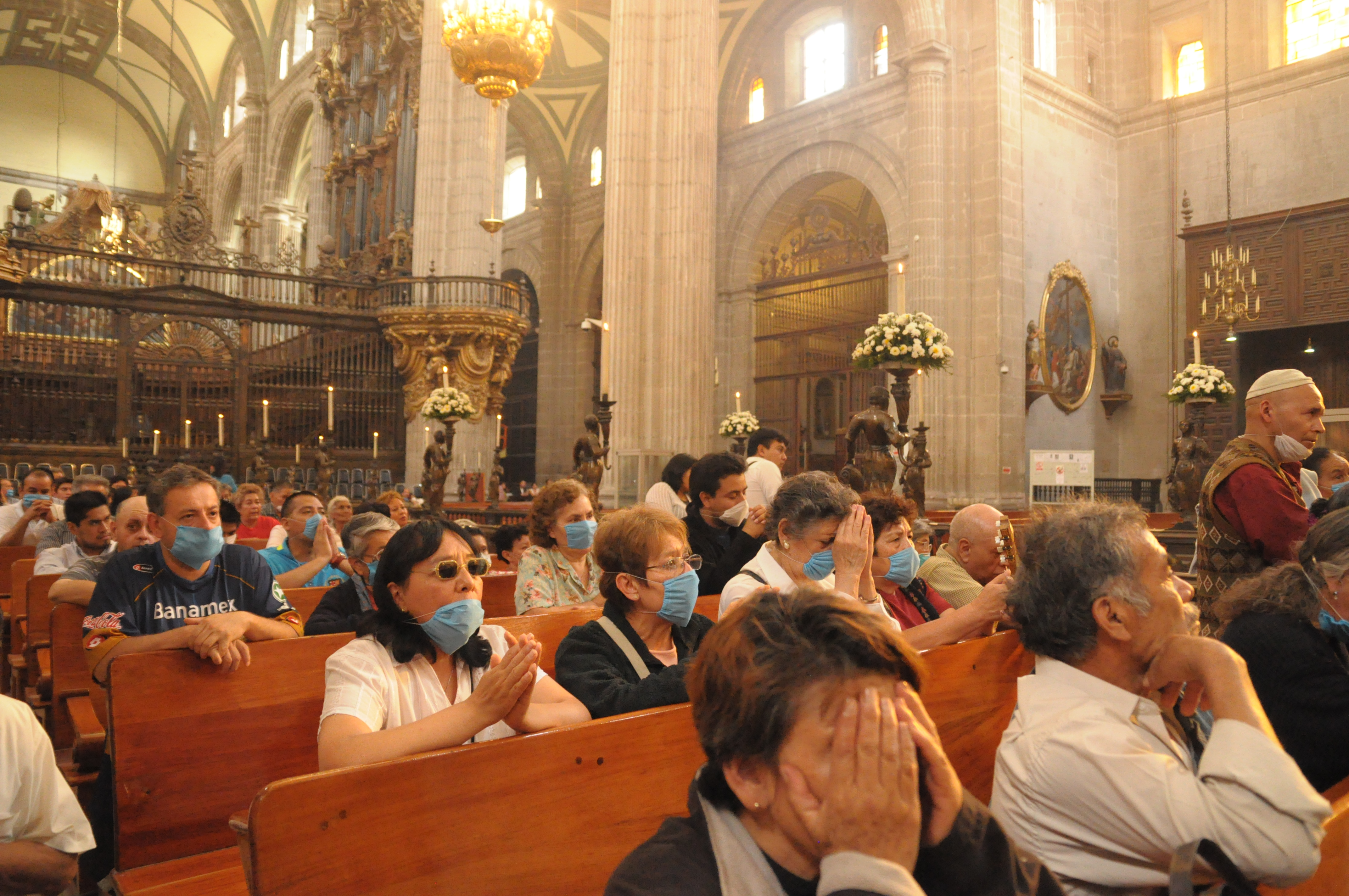 Ayer 26 de Abril, algunos católicos se reunieron en la catedral metropolitana (México D.F.) para pedir a Dios. Por los enfermos, los tomadores de decisiones y la sociedad en general. Para que hagan "lo correcto" frente a la epidemia de influenza porcina en nuestro país. Some catholics gathered yesterday at the Metropolitan Cathedral (in Mexico City). They prayed for the sick people, the government and the rest of the society. Hoping they make "good decisions" against the swine flu epidemic in our country. Foto sin edición